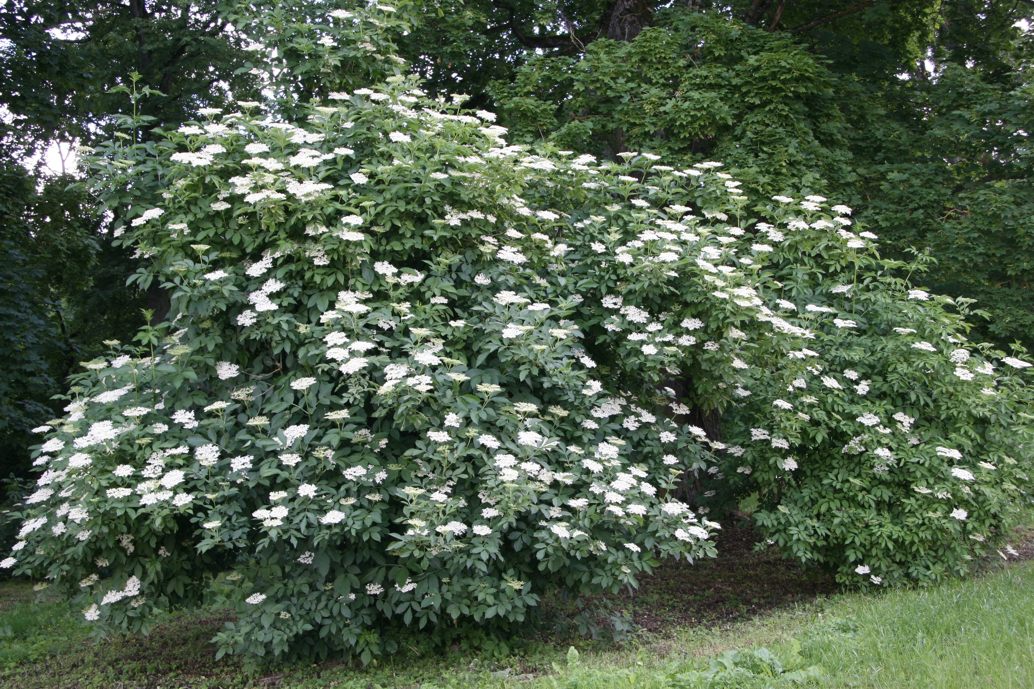 Blankenfeldes muižas vērtība - plūškoks.